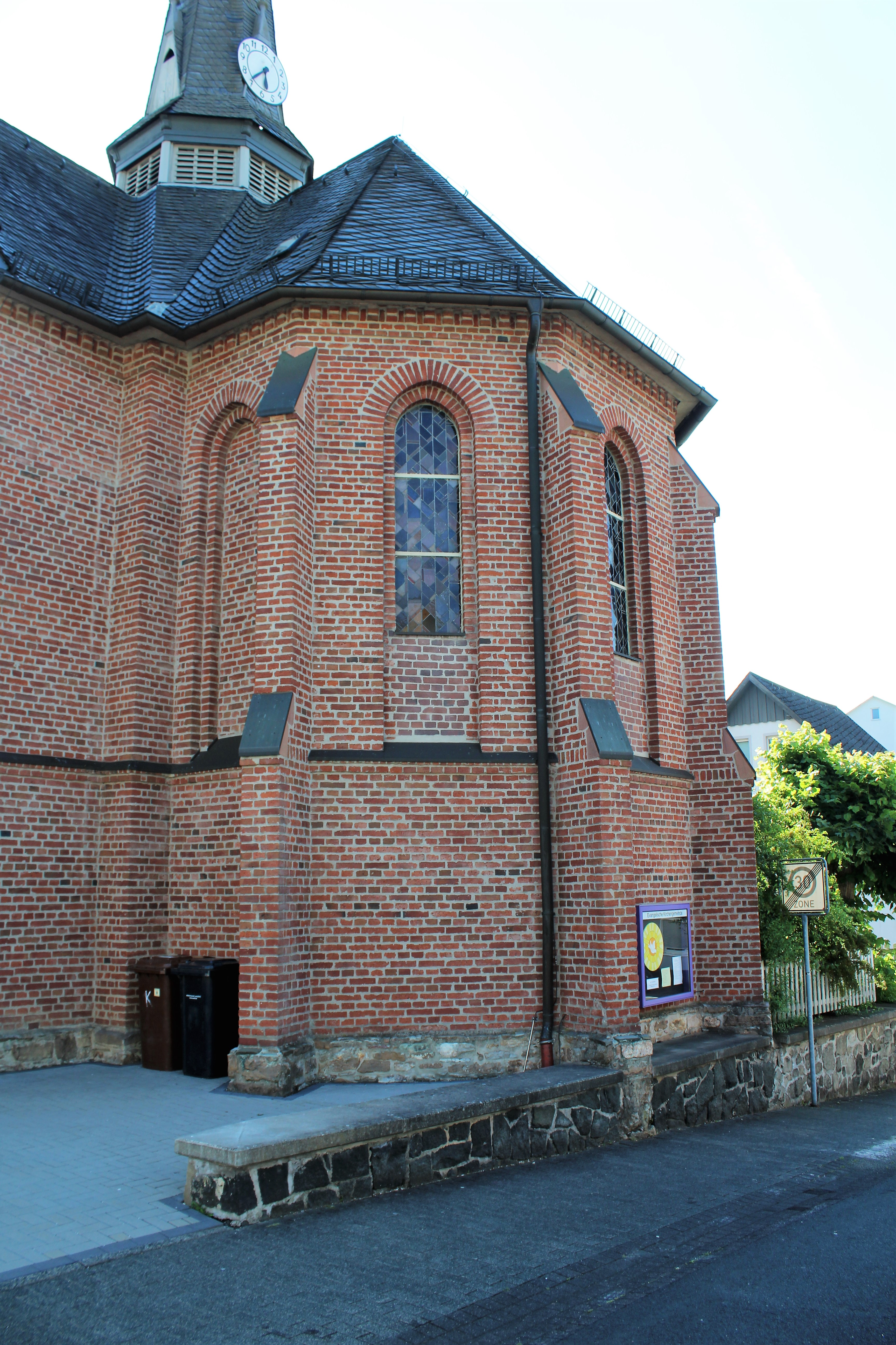 Ev. Kirche Wissenbach, Gemeinde Eschenburg, Hessen, Deutschland